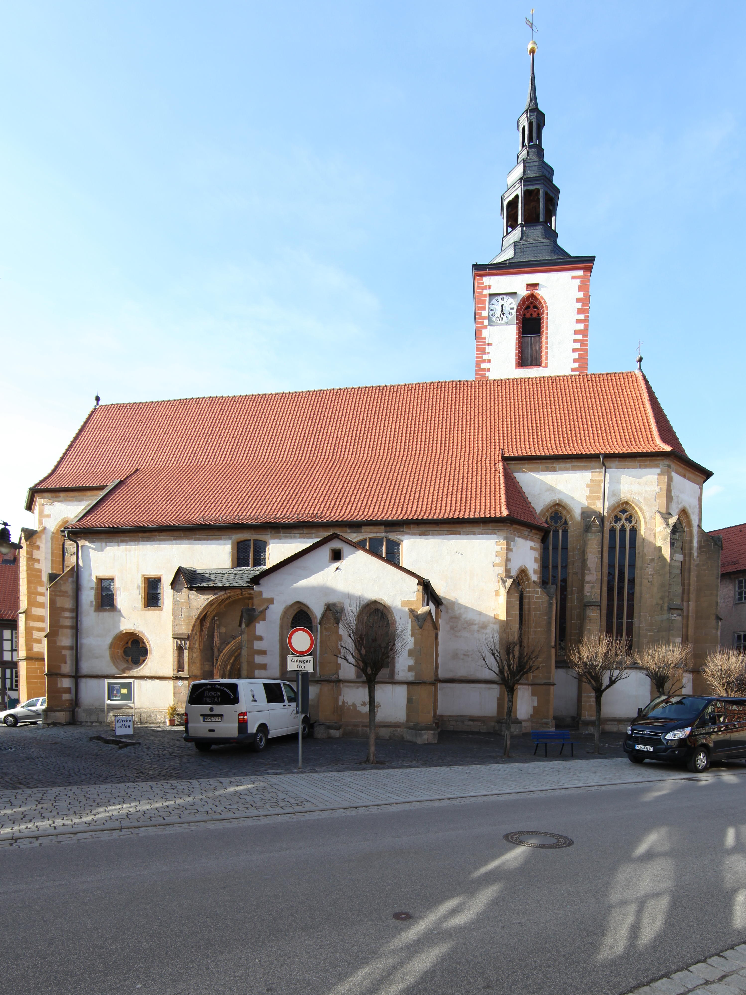 Evangelisch-Lutherische Stiftskirche in Römhild, Landkreis Hildburghausen